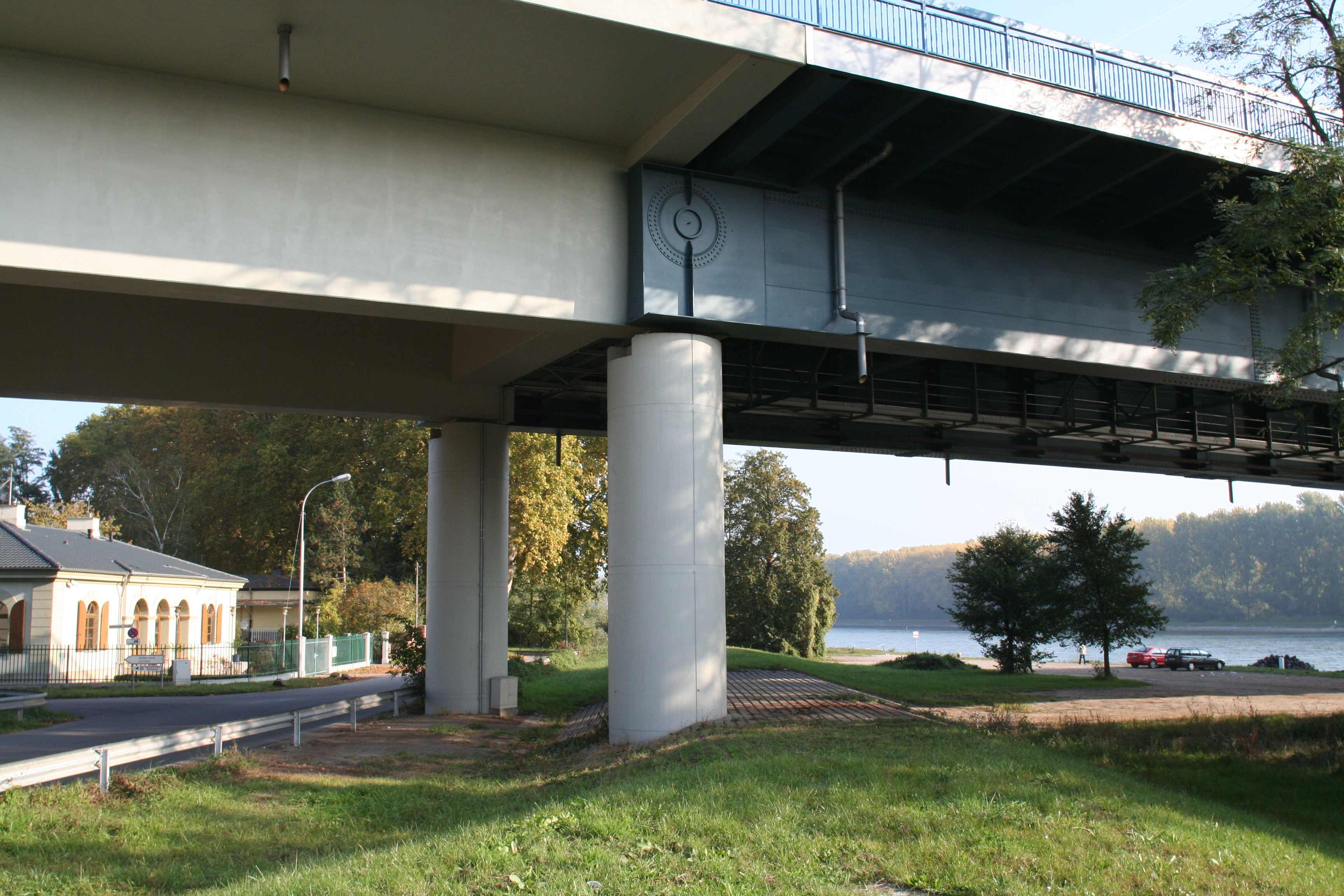 Rheinbrücke Germersheim B35